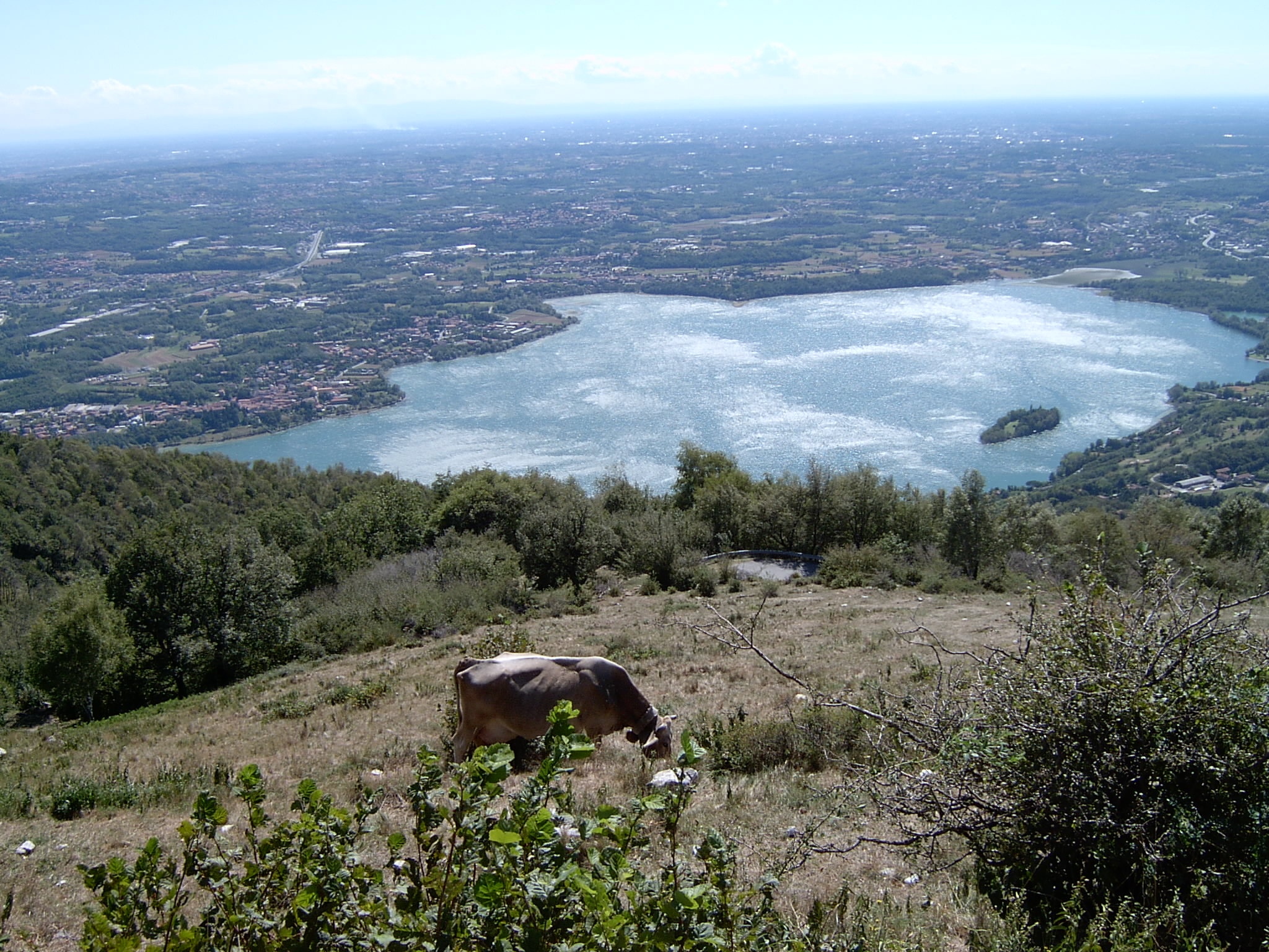 Vista del Lago di Pusiano dal Monte Cornizzolo diviso a metà con la Provincia di Como.